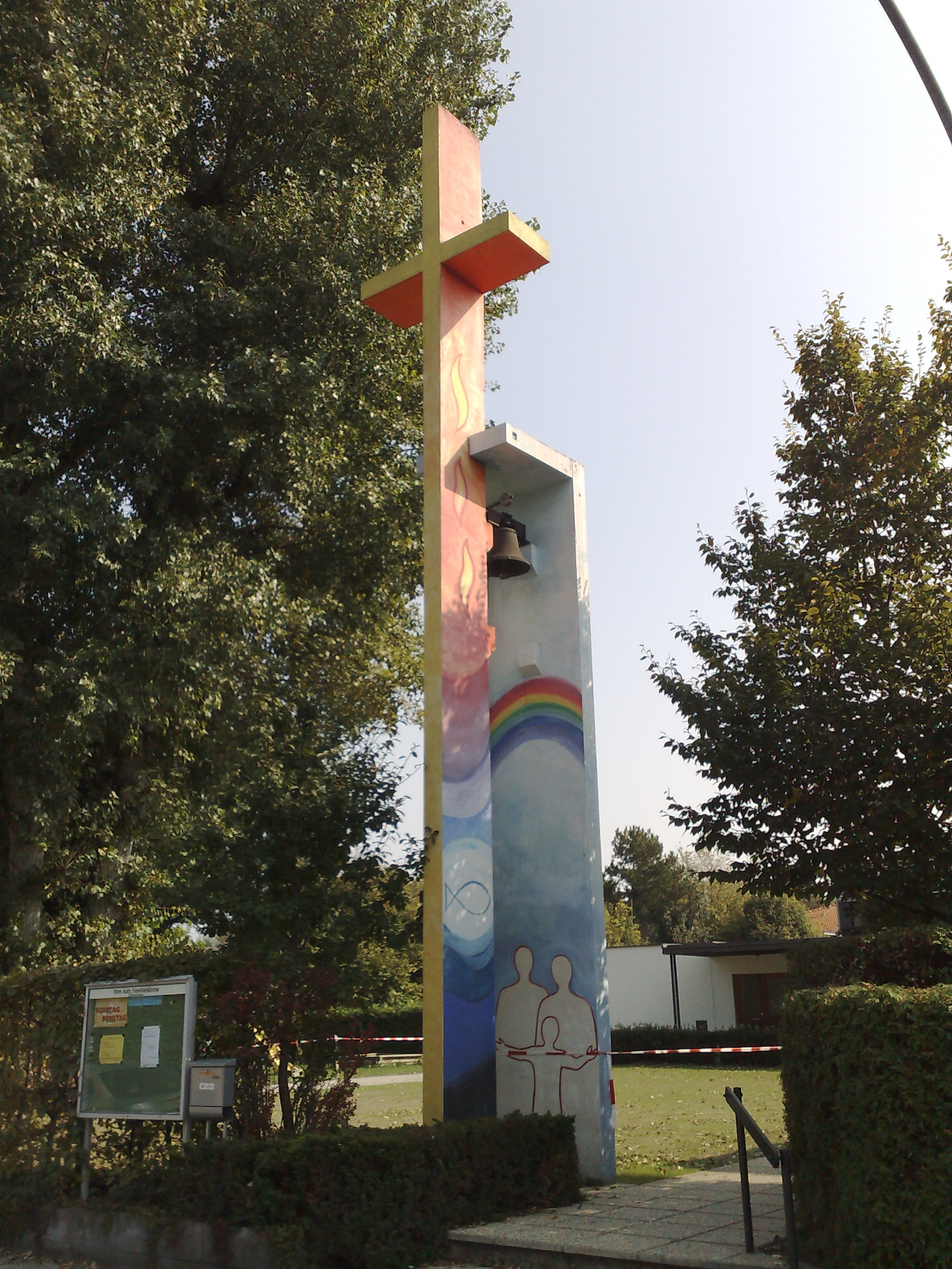 Der freistehende Glockenturm der Filialkirche Heilige Familie Schmuckerau in der Gemeinde Wiener Neustadt